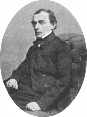 Немецкий врач и философ Рудольф Герман Лотце (1817-1881)